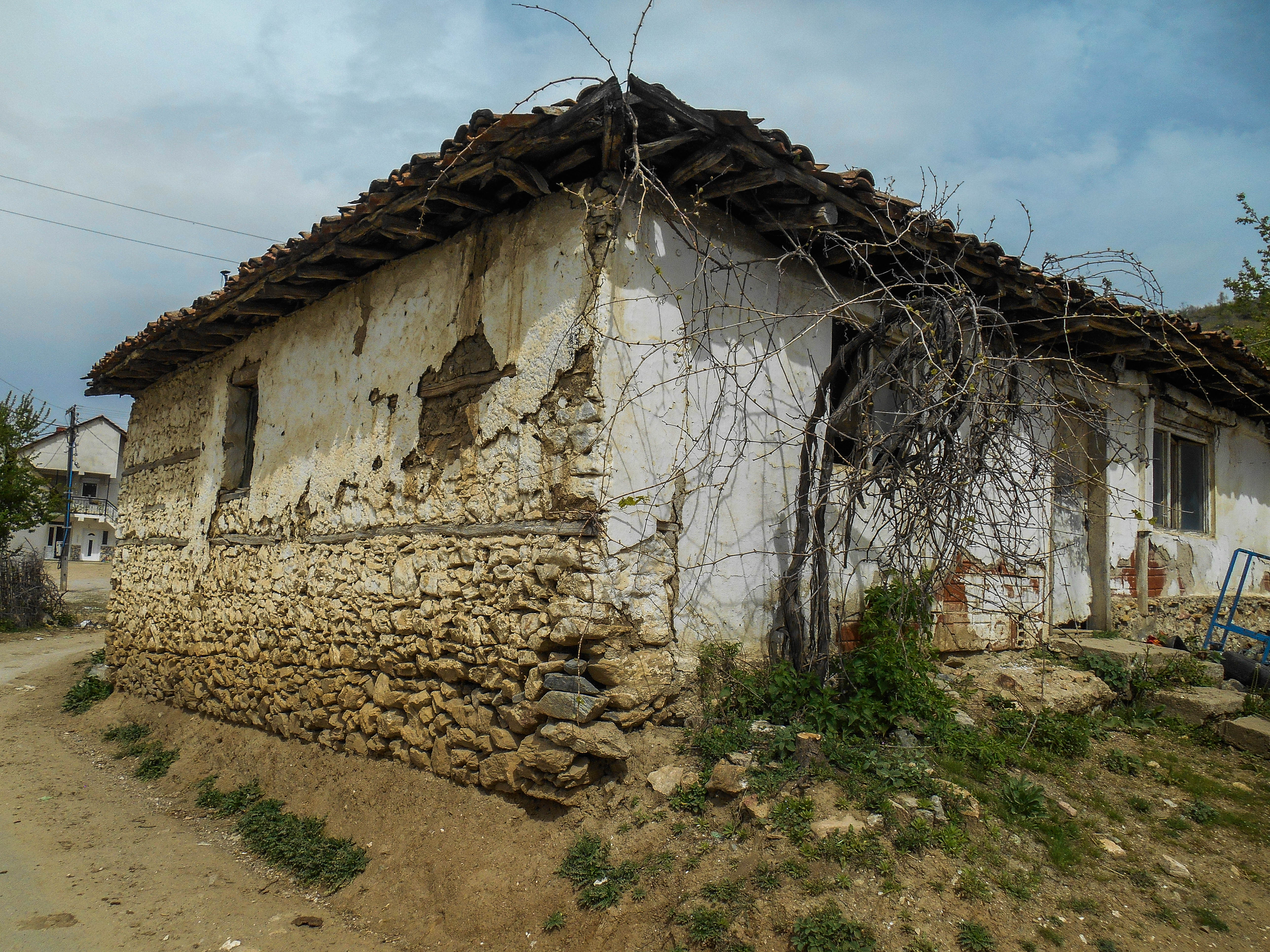 Куќа во Рич